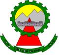 Brasão de Armas do município de São José da Lapa, Minas Gerais, Brasil.